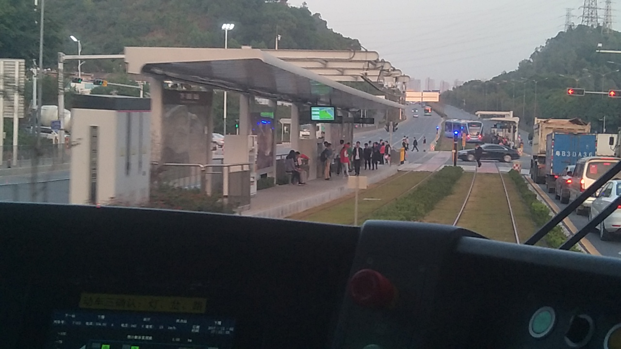 深圳有轨电车下围站始发月台，位于龙华区